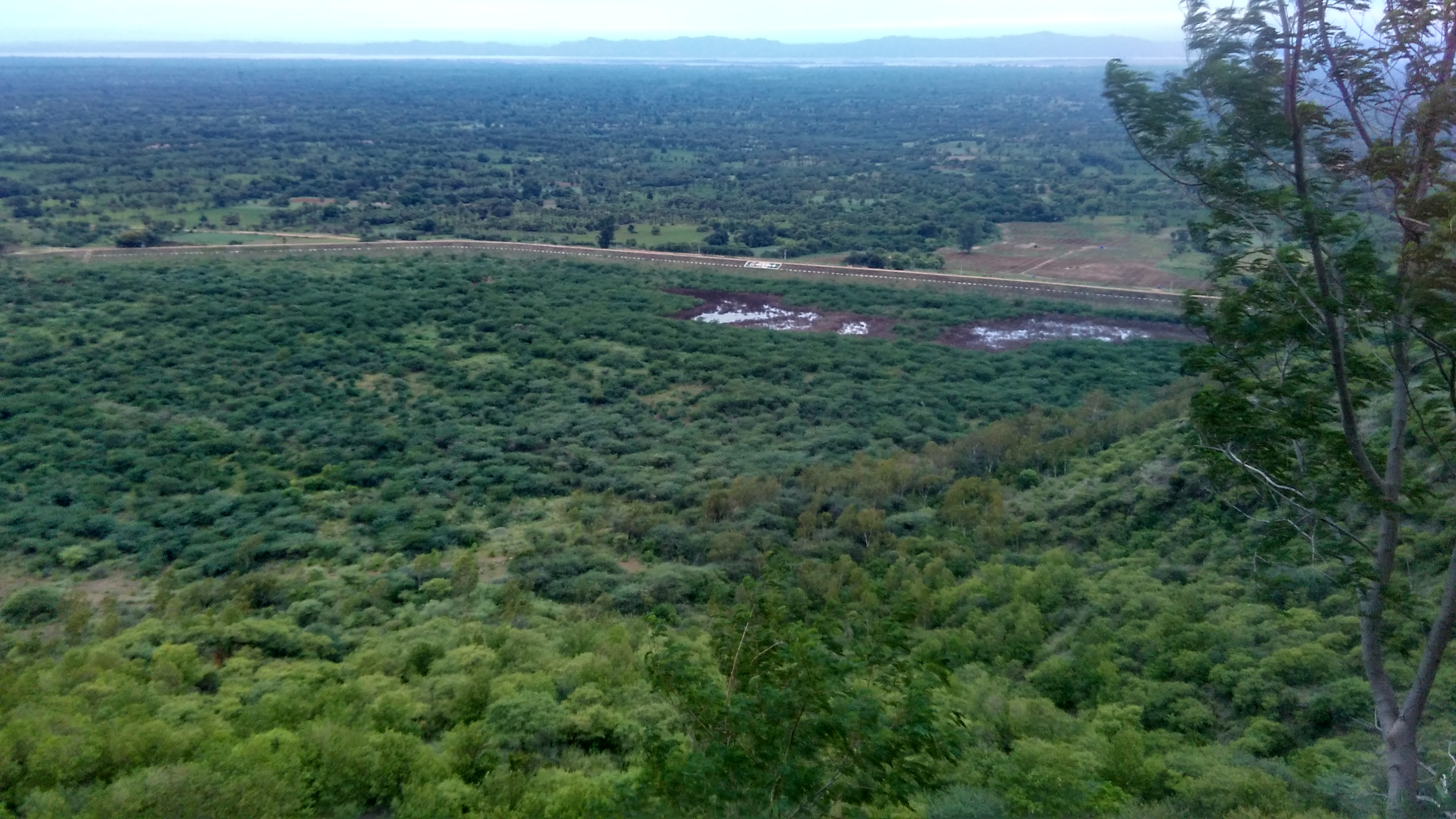 မြန်မာဘာသာ: မြကန်ဆည်ကို တုရင်တောင်စေတီမှ မြင်ရပုံ။ မန္တလေးတိုင်းဒေသကြီး၊ ပုဂံတွင် တည်ရှိသည်။